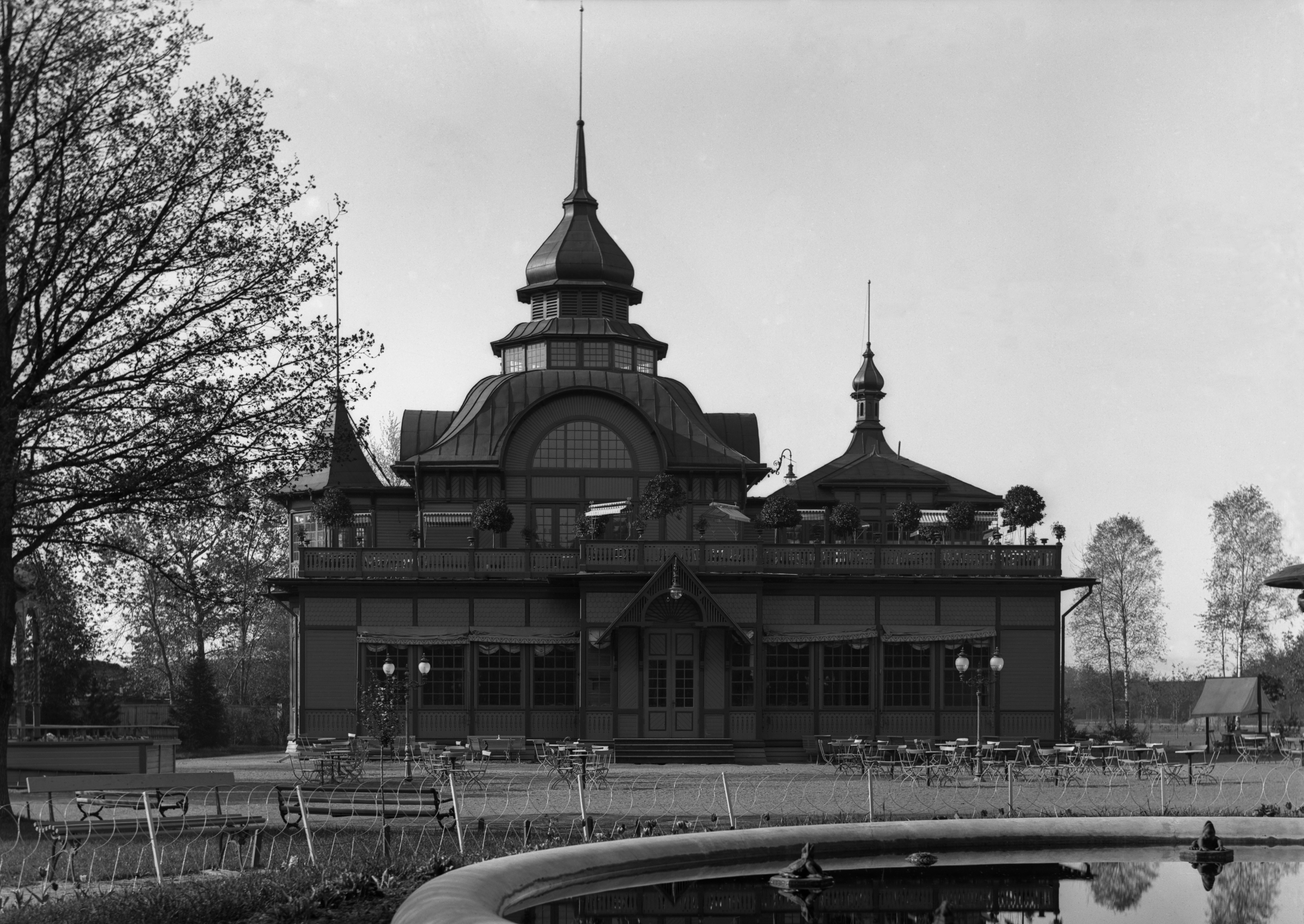 Stadsträdgården med 1900 års nya restauranglokal.